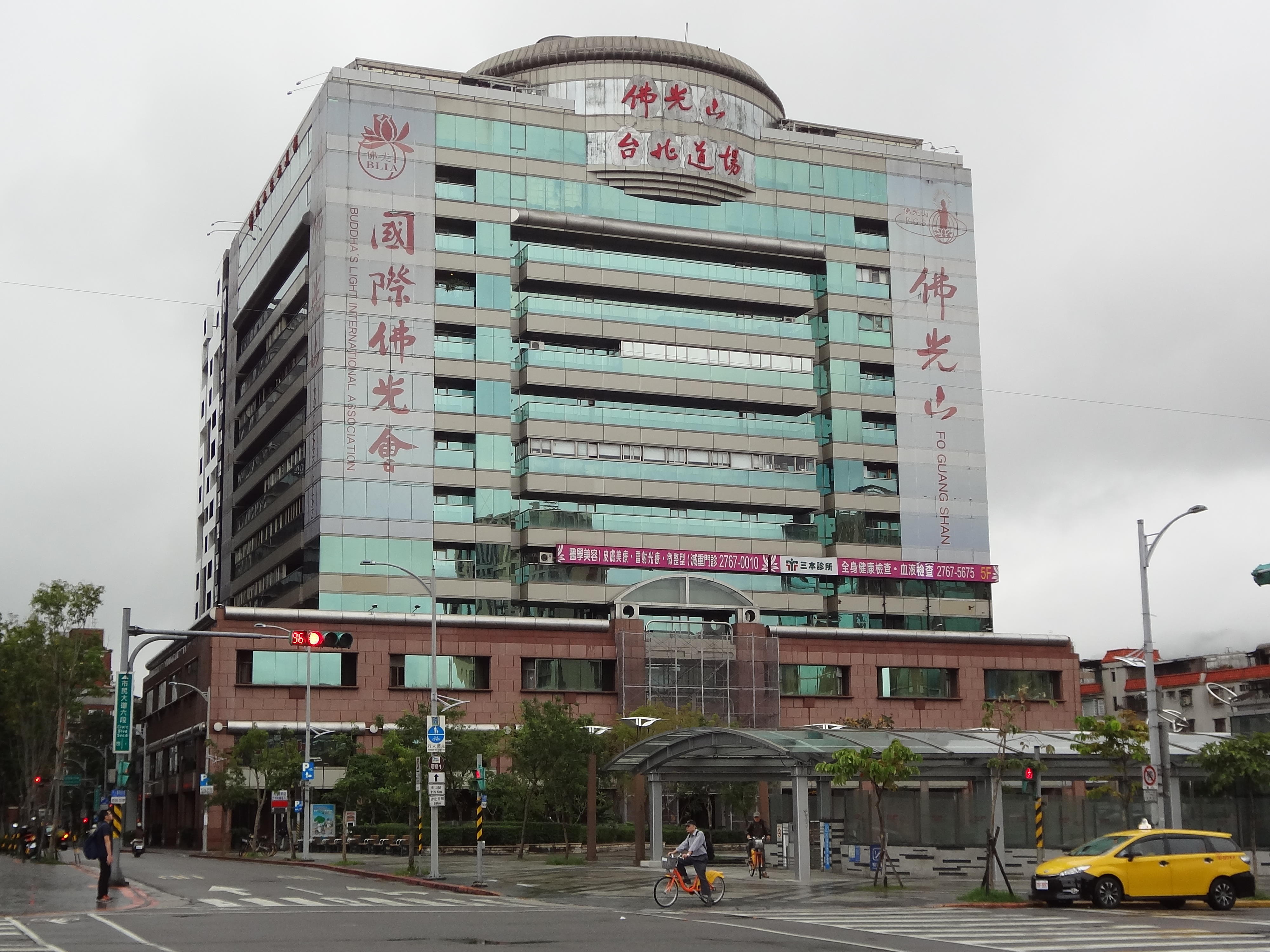 佛光山台北道場所在的朝代大廈，位於臺北市信義區松隆路327號。